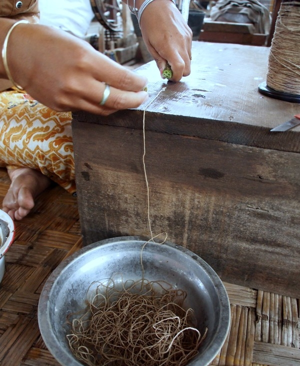 Silk yarn from lotus stalk - Lotusseide: Garn vom Stängel der Lotospflanze